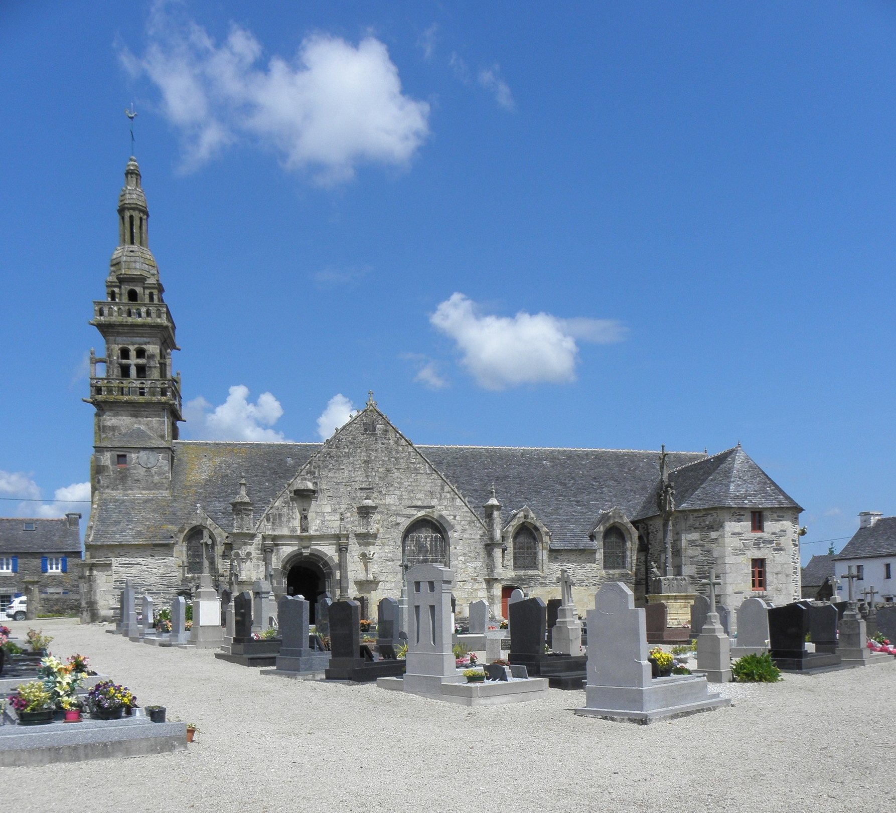 Église Sainte-Pitère du Tréhou (29). Vue méridionale.